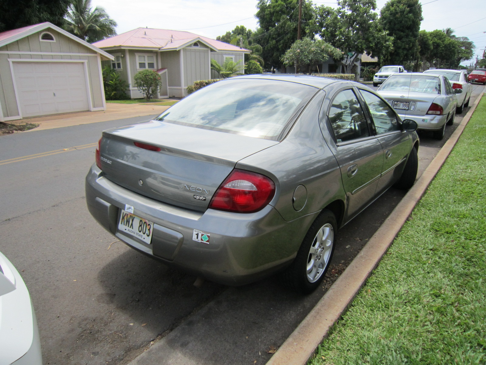 Dodge Neon